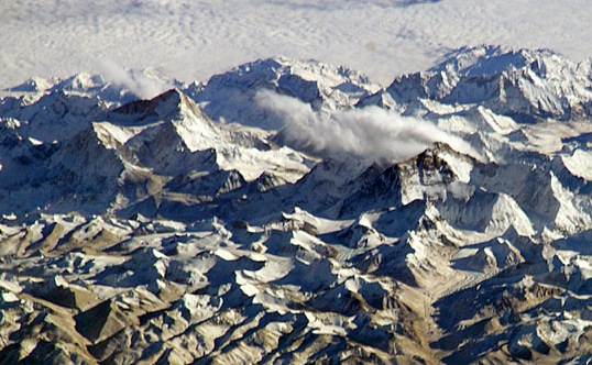 Bild vom Mount Everest (8850 Meter, rechts) und vom Makalu (8462 Meter, links)